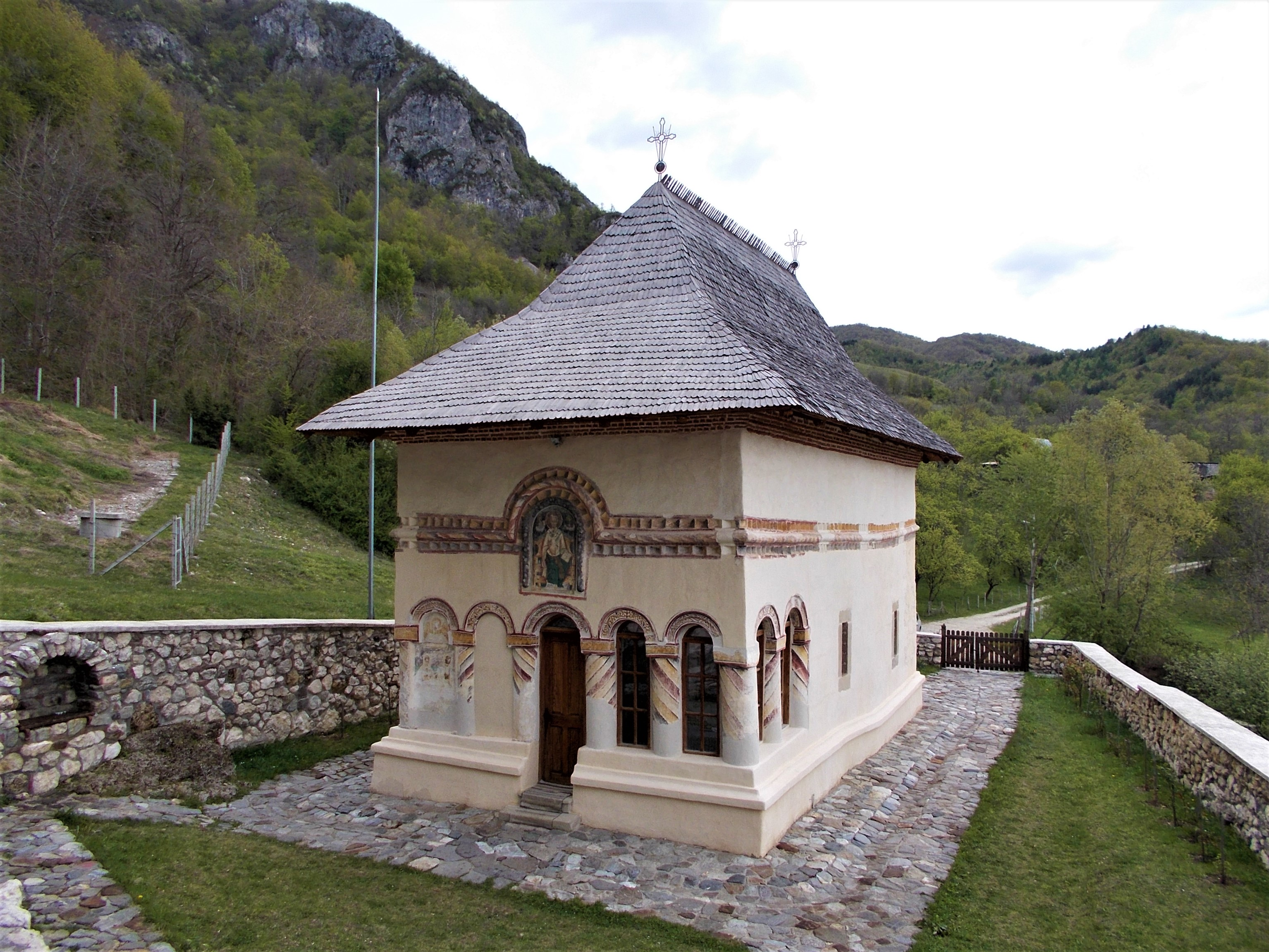 Biserica "Sfântul Nicolae" a fostului schit "De sub Piatră" din satul Pietreni, județul Vâlcea